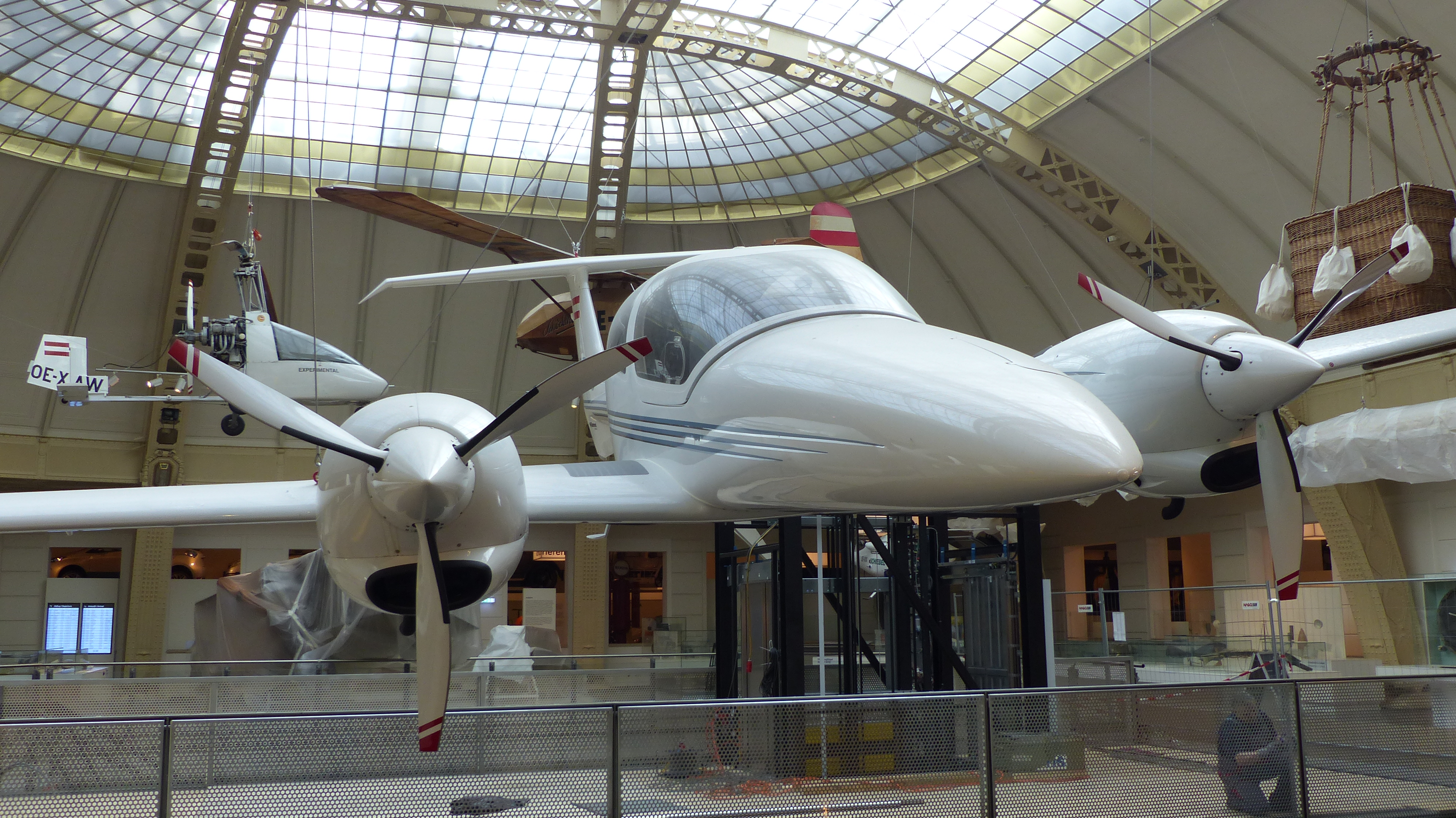 Diamond DA42 Twin Star (OE-VPS), 2002, Exponat im Technischen Museum Wien